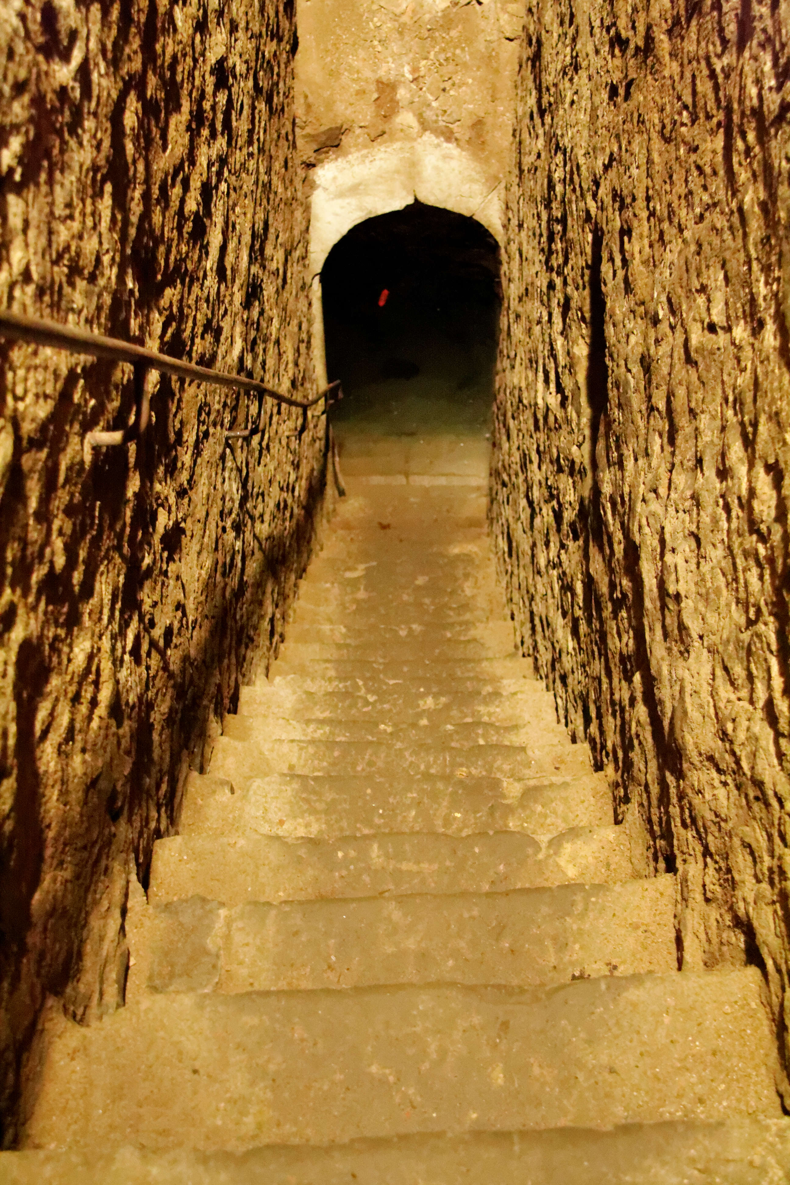 Obernbreit, ehemalige Synagoge in der Kirchgasse, Abgang zur Mikwe